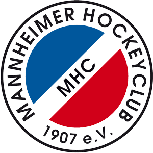 Logo des Mannheimer Hockeyclub 1907 e.V.